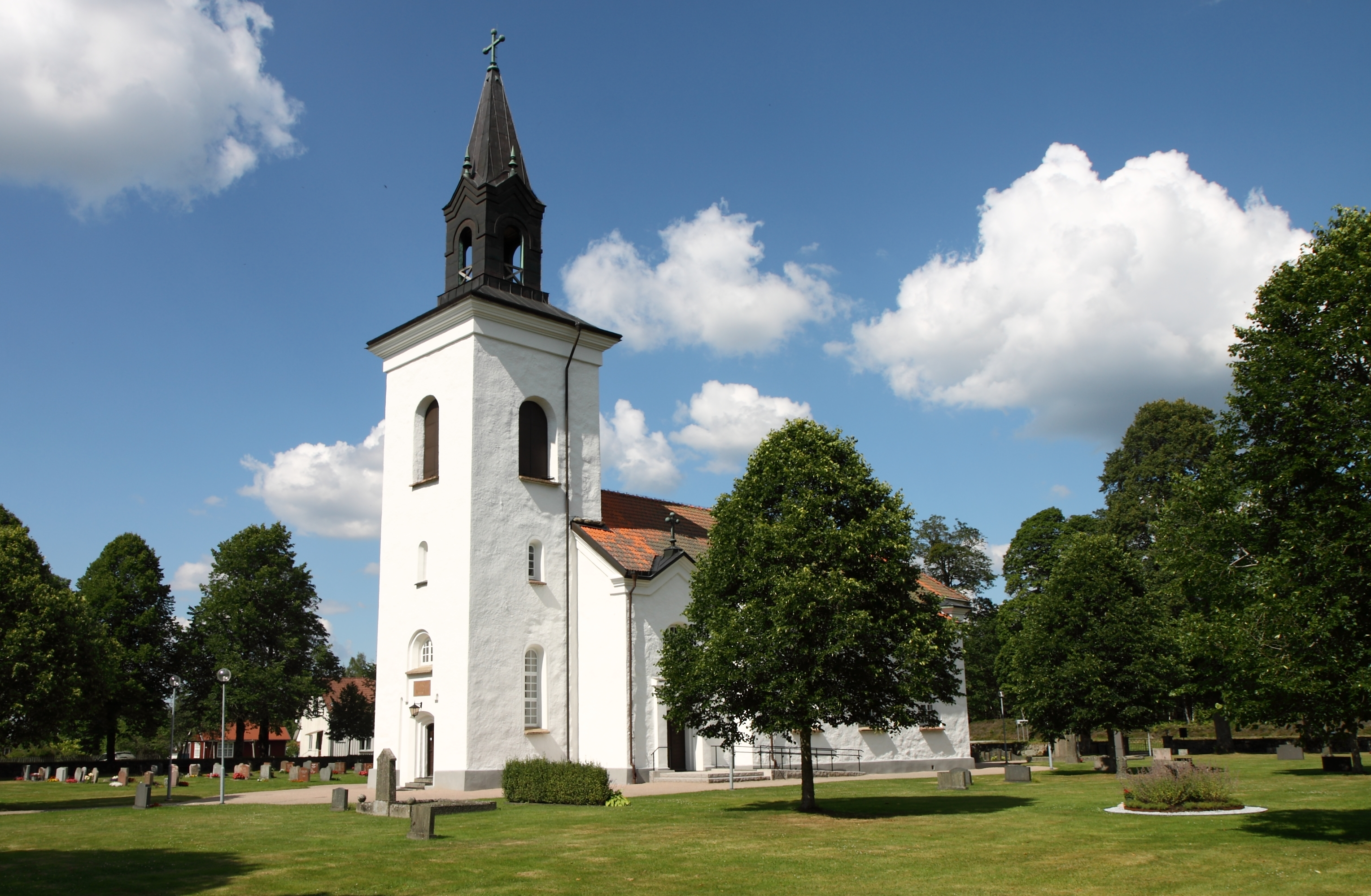 Tämta kyrka.